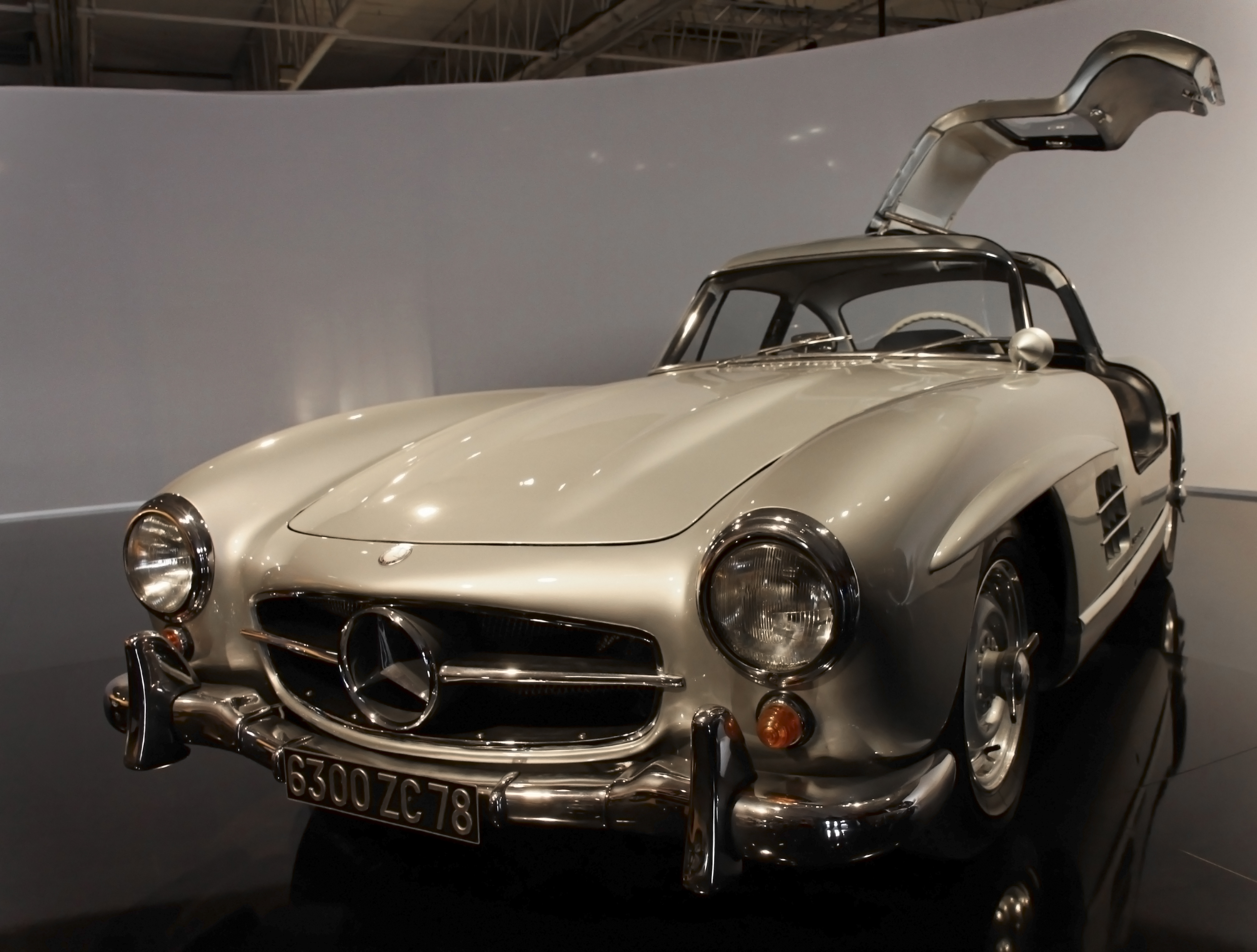 Une Mercedes 300SL exposée au Mondial de l'automobile 2010 de Paris.